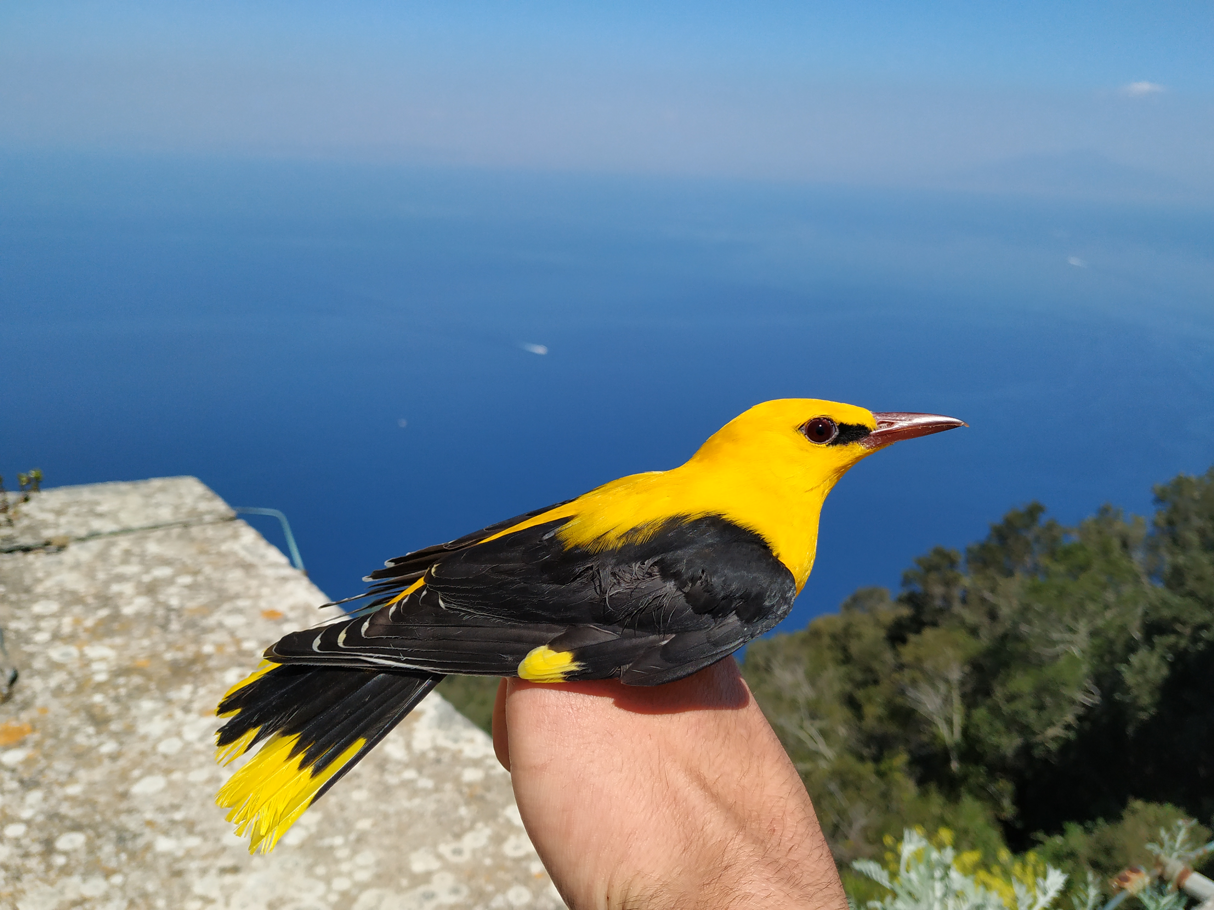 Sommargylling, hane, ringmärkt vid Capri fågelstation